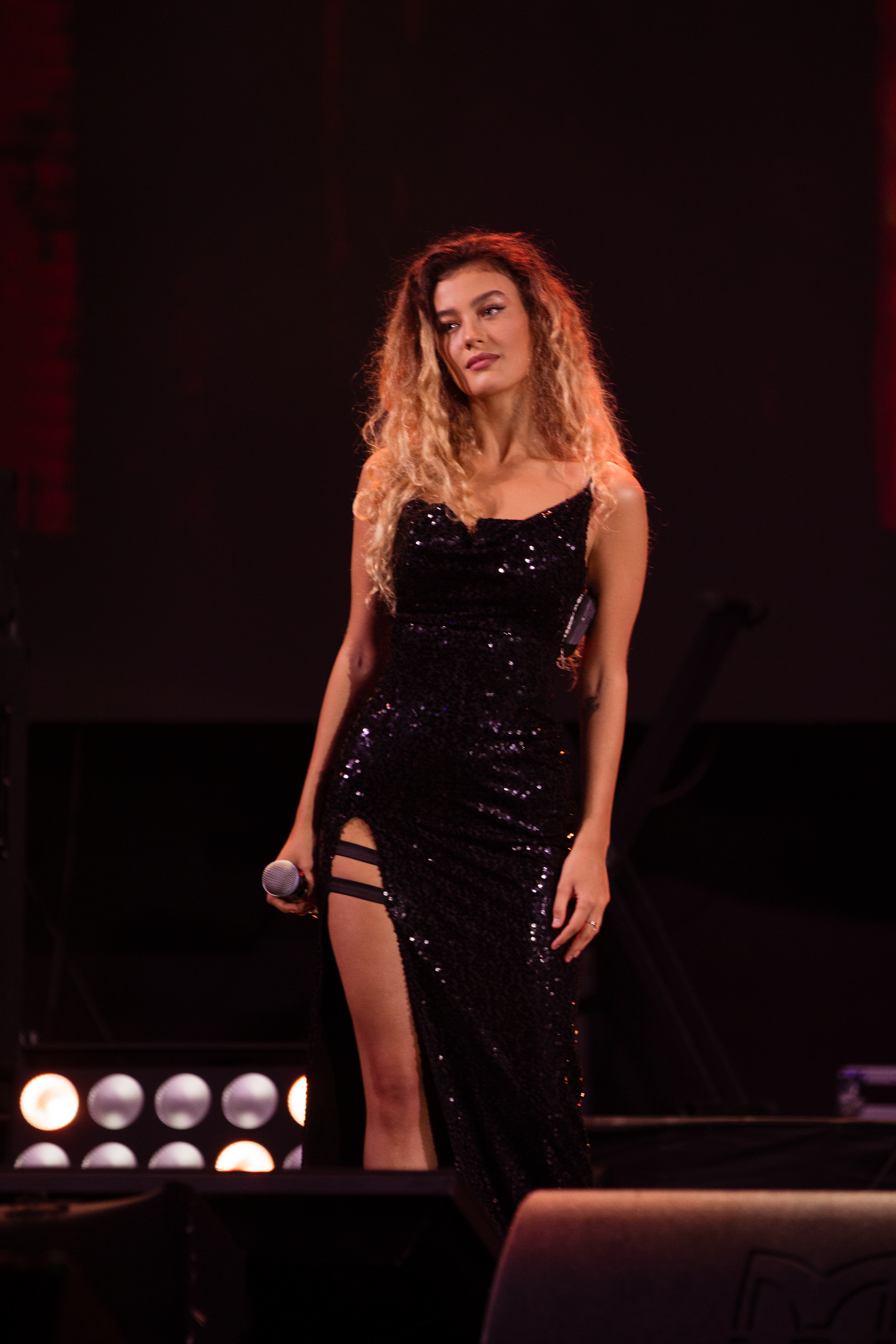 Ульяна Синецкая в составе группы "ВИА Гра" во время выступления на фестивале "Лайма Рандеву"